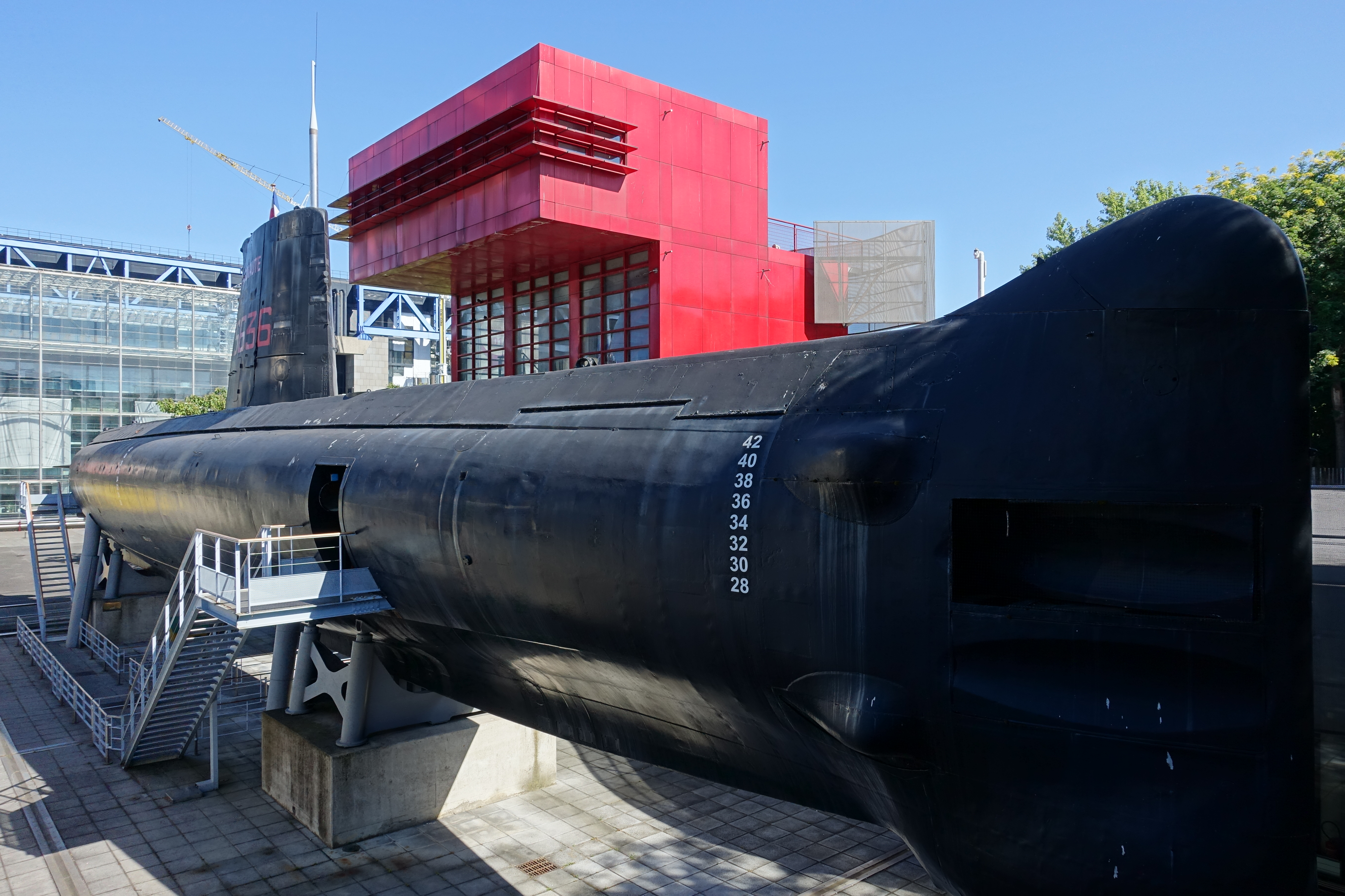 Argonaute submarine @ Parc de La Villette @ Paris